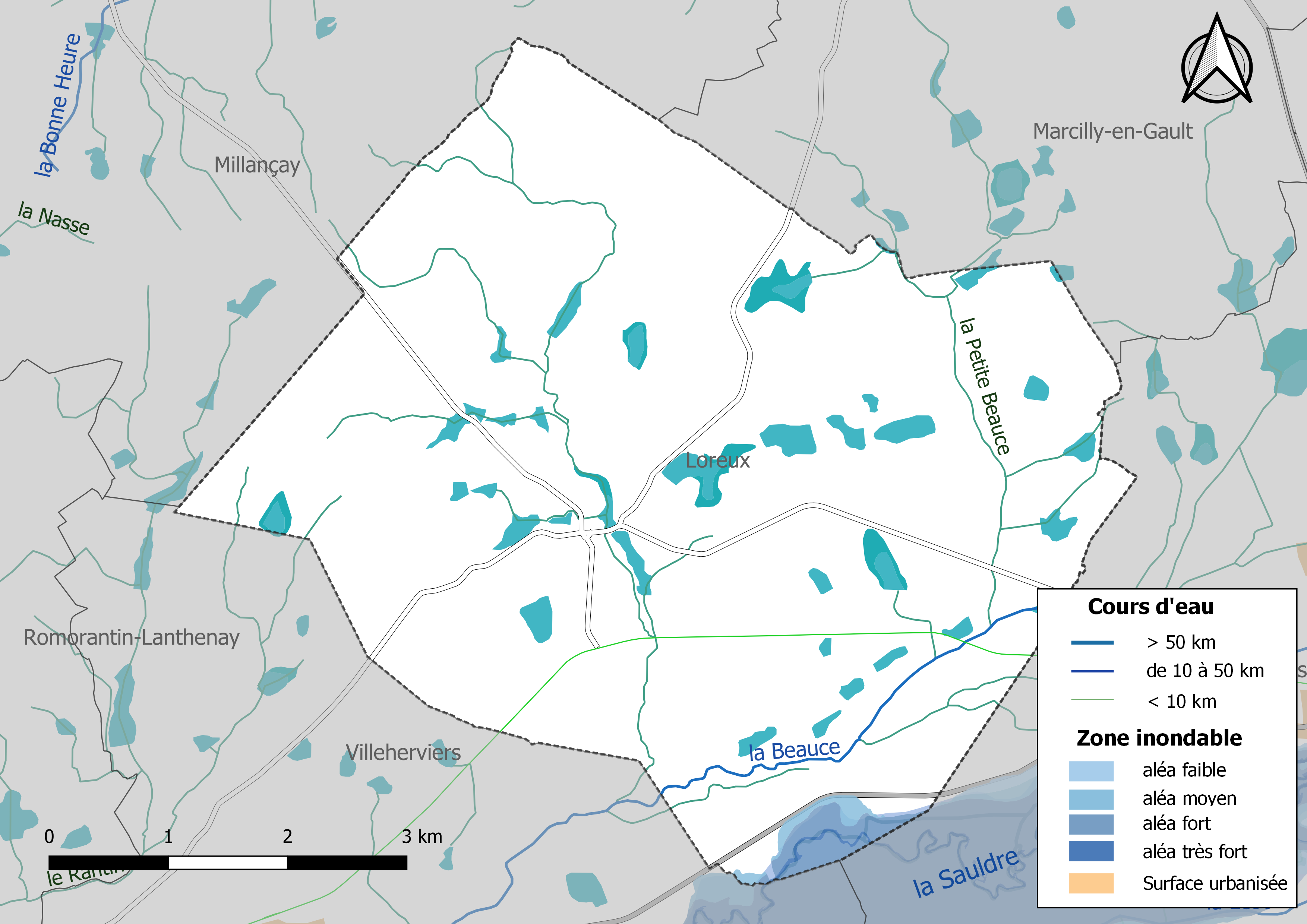 Carte des zones inondables de la commune de Loreux (France).